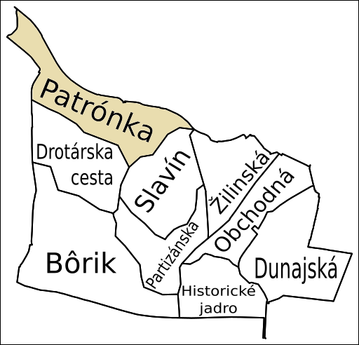 Oblasť Patrónka, Staré Mesto, Bratislava